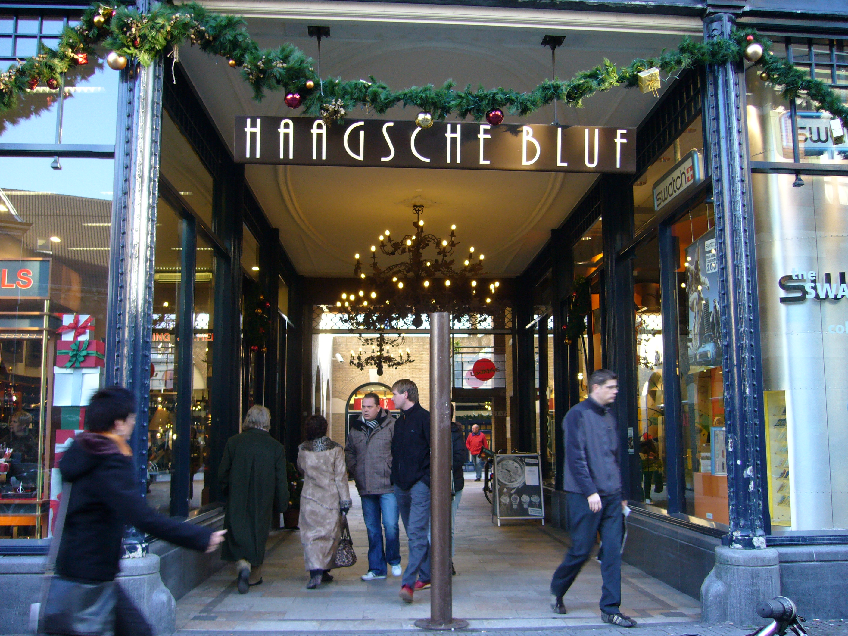 Den Haag, Haagse Bluf, entree